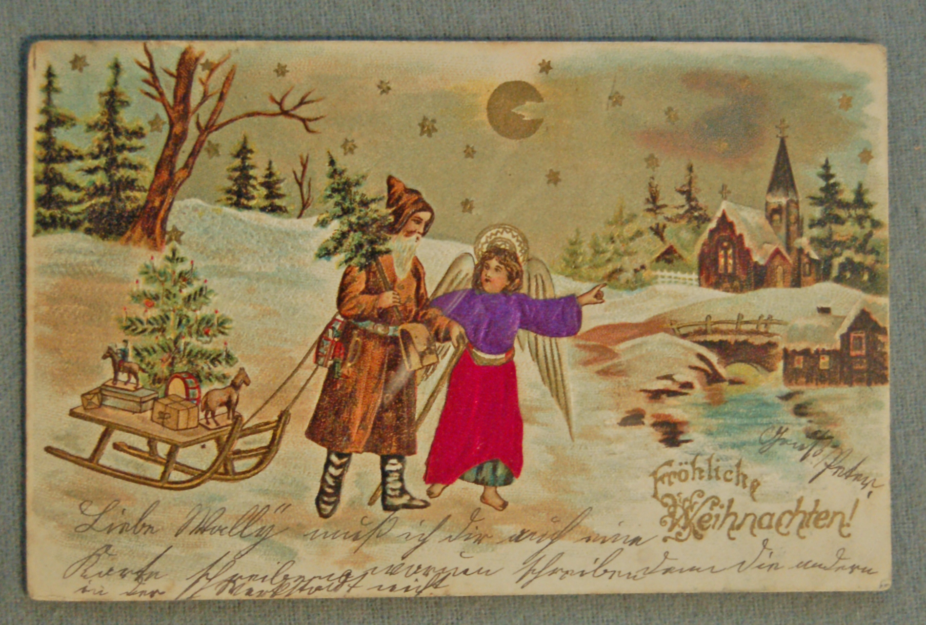 Weihnachtspostkarte aus Deutschland um 1900 TEXT Liebe Wally muß ich Dir auch eine Karte schreiben [???] warum schreiben denn die andern in der Werkstadt nicht